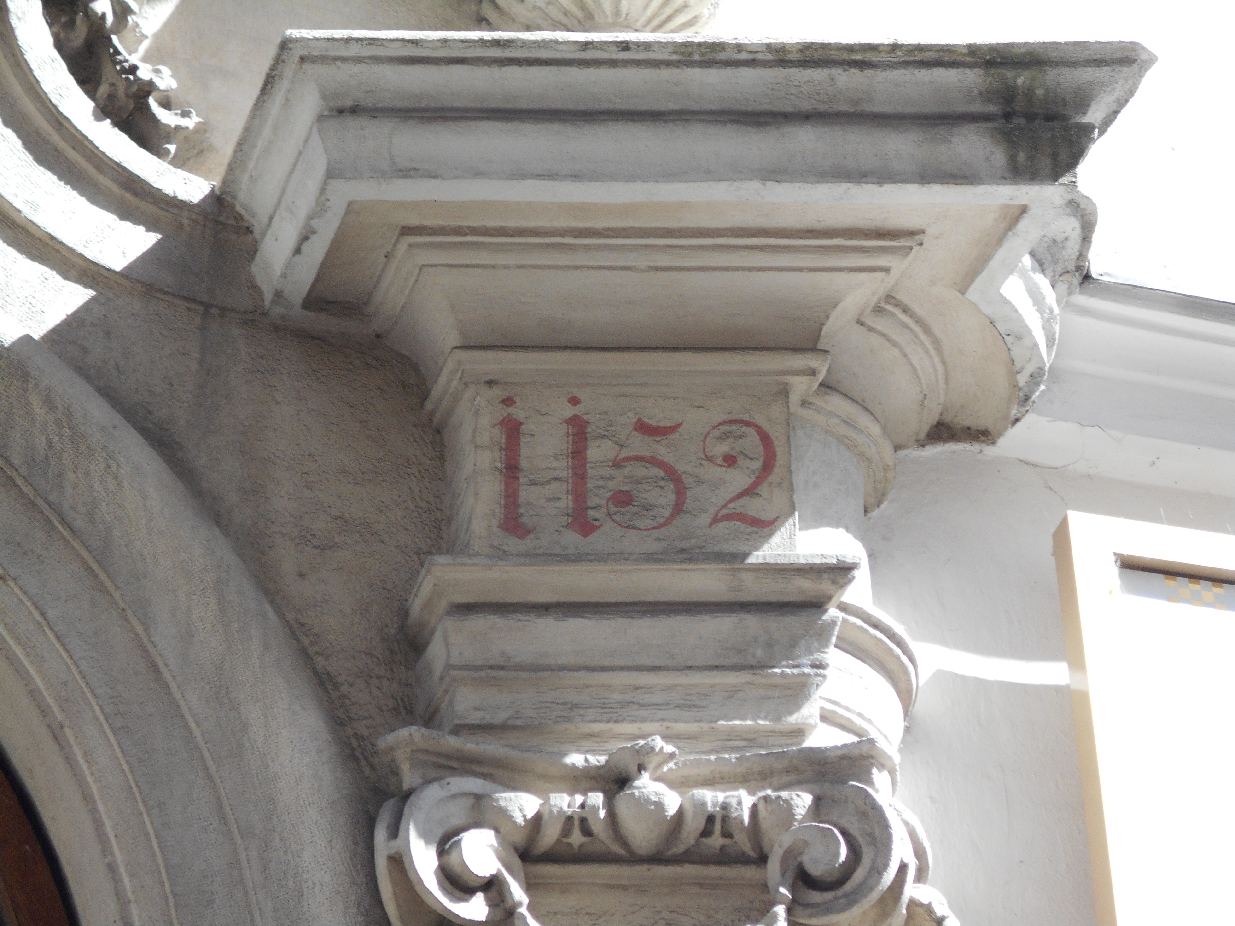 Konskriptionsnummer am Großen Michaelerhaus in der ursprünglichen Form der 1770er-Jahre mit roter Farbe (Rekonstruktion) Template:Do